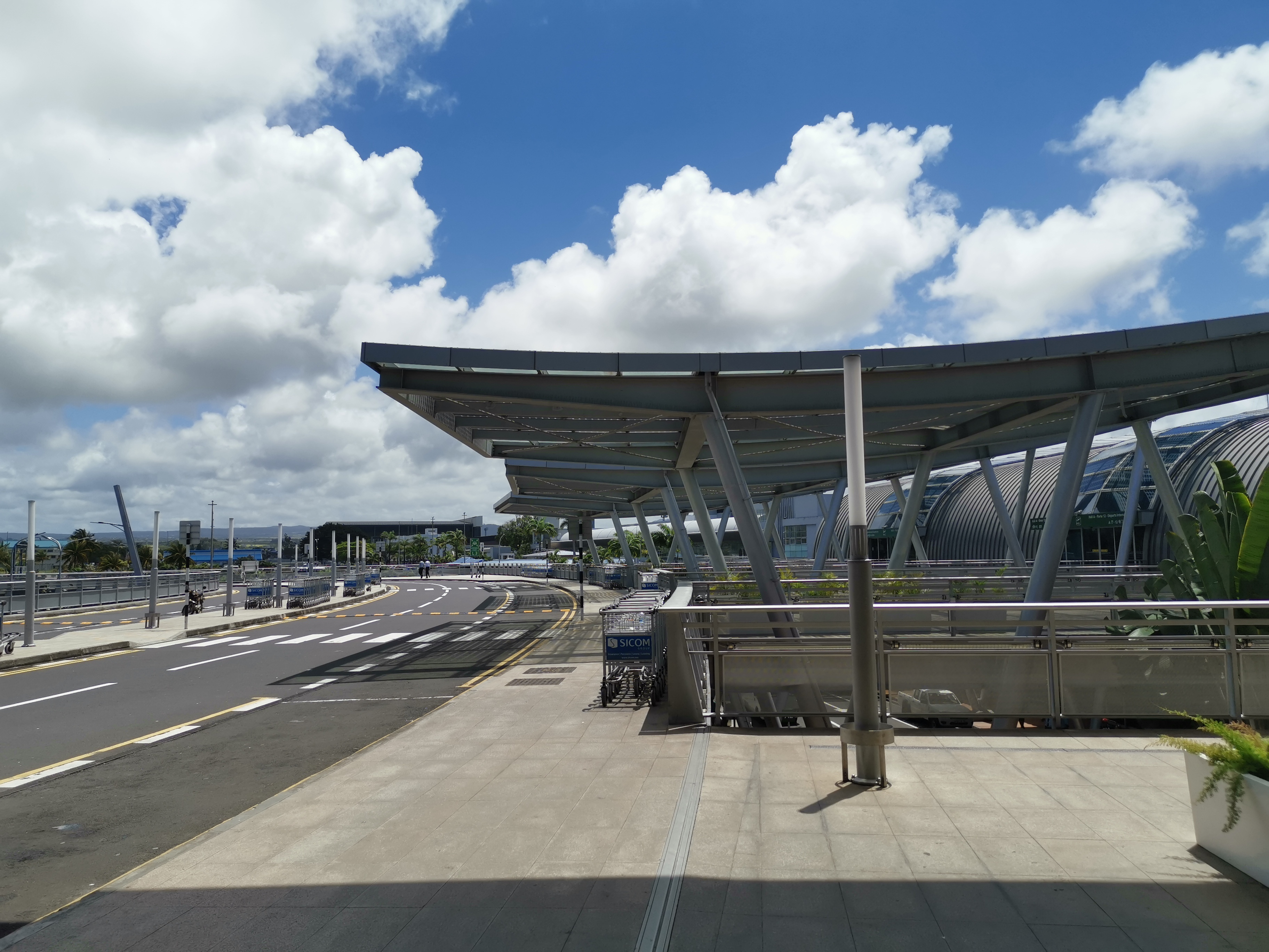 Flughafen in Mauritius